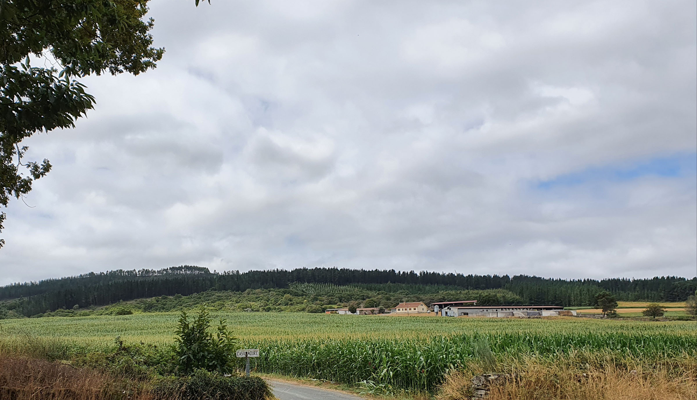 Lugar de Casilmoure, da parroquia de Amoexa, no concello lugués de Antas de Ulla (Lugo)